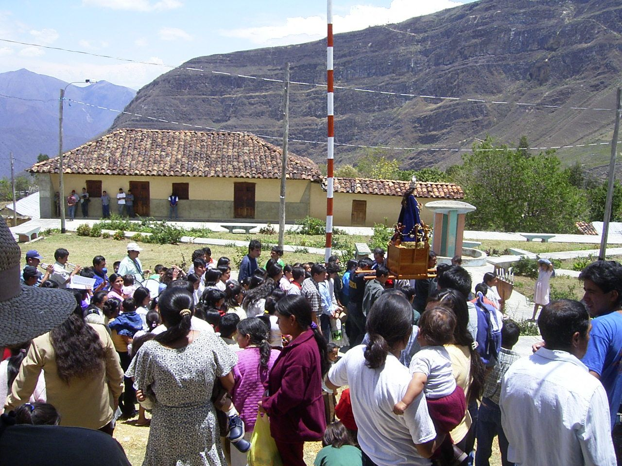 Plaza de Armas de Cocabamba, Luya, Amazonas, Peru